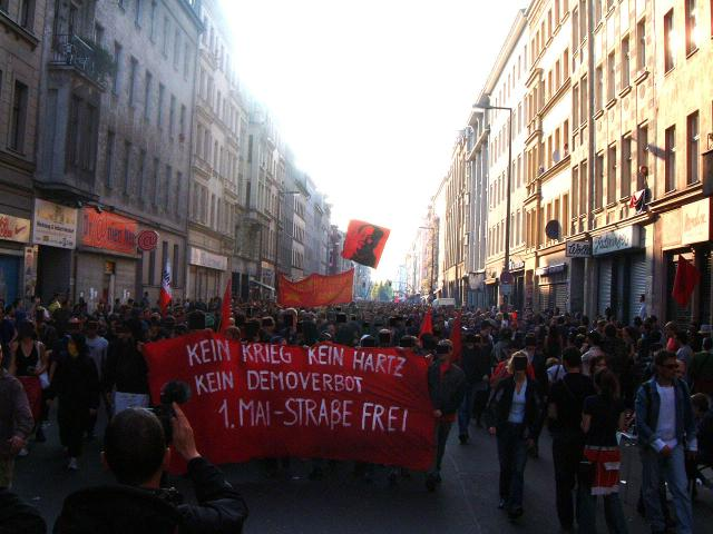 Revolutionäre 1. Mai Demonstration 2005, Oranienstraße in Berlin-Kreuzberg, nicht angemeldete Spontandemonstration